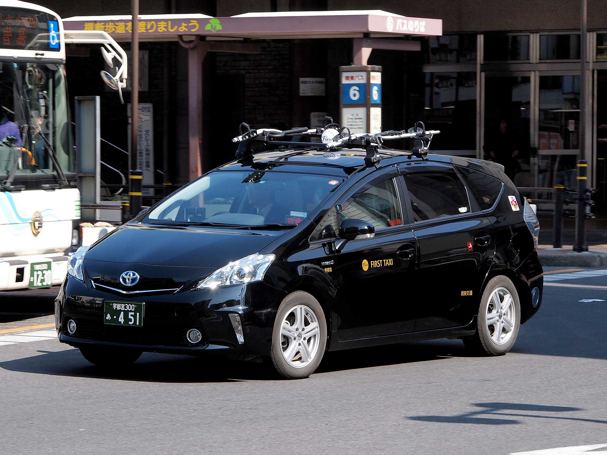 ファーストタクシーグループ・関東交通のトヨタ・プリウスα。関東交通・塩原自動車・那須合同自動車に配置され、通常のタクシーとして利用できるほか、自転車のパンク修理やサイクリストの救護活動にあたる。 登録番号：宇都宮300あ・451 撮影地：栃木県宇都宮市、JR宇都宮駅西口